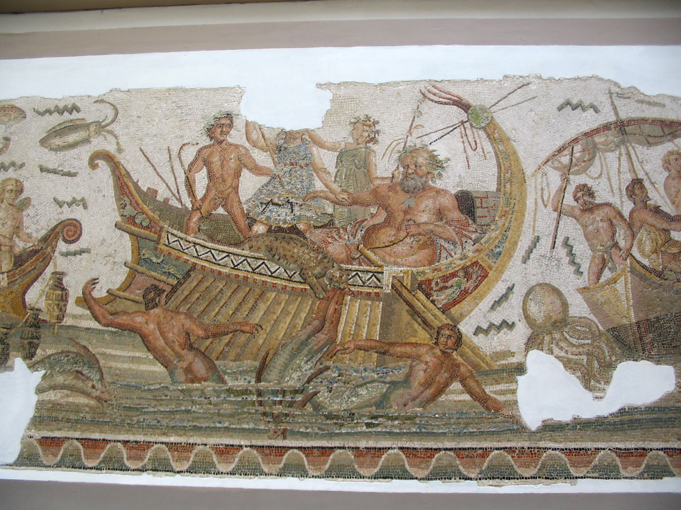 Il corteggio di Bacco lotta contro creature marine. Mosaico pavimentale romano al Museo del Bardo a Tunisi. II secolo d.C.